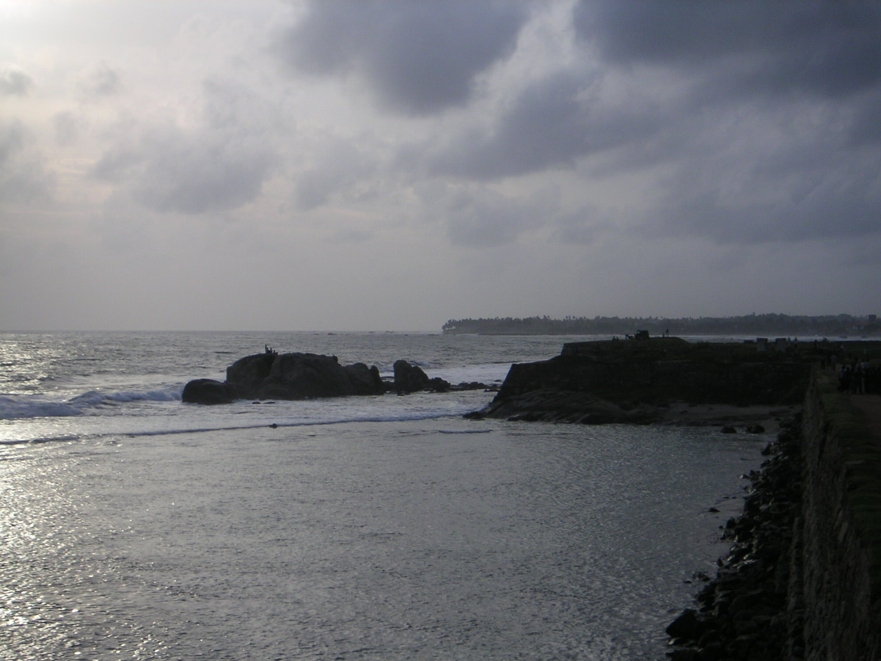 Galle, Sri Lanka. Photo: Soman